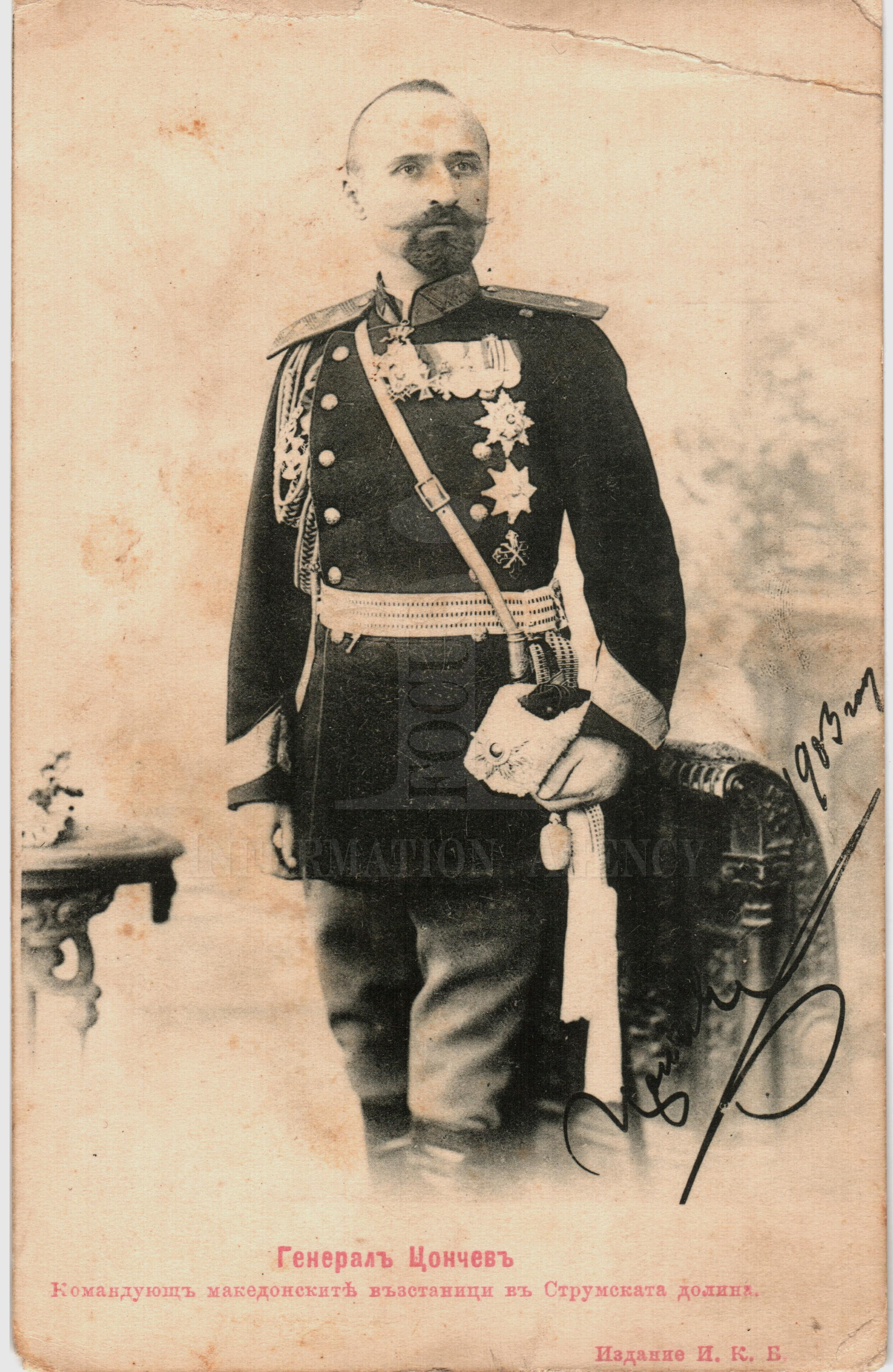 Български Иван Цончев (1858-1910), Генерал и революционер, войвода на Върховния македонски комитет, основен организатор на Горноджумайското и участник в Илинденското въстание Deutsch Iwan Zontschew (1858-1910), bulgarischer Militär, General und Freiheitskämpfer